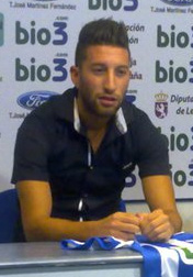 Sergio Rodríguez en su presentación con la SD Ponferradina